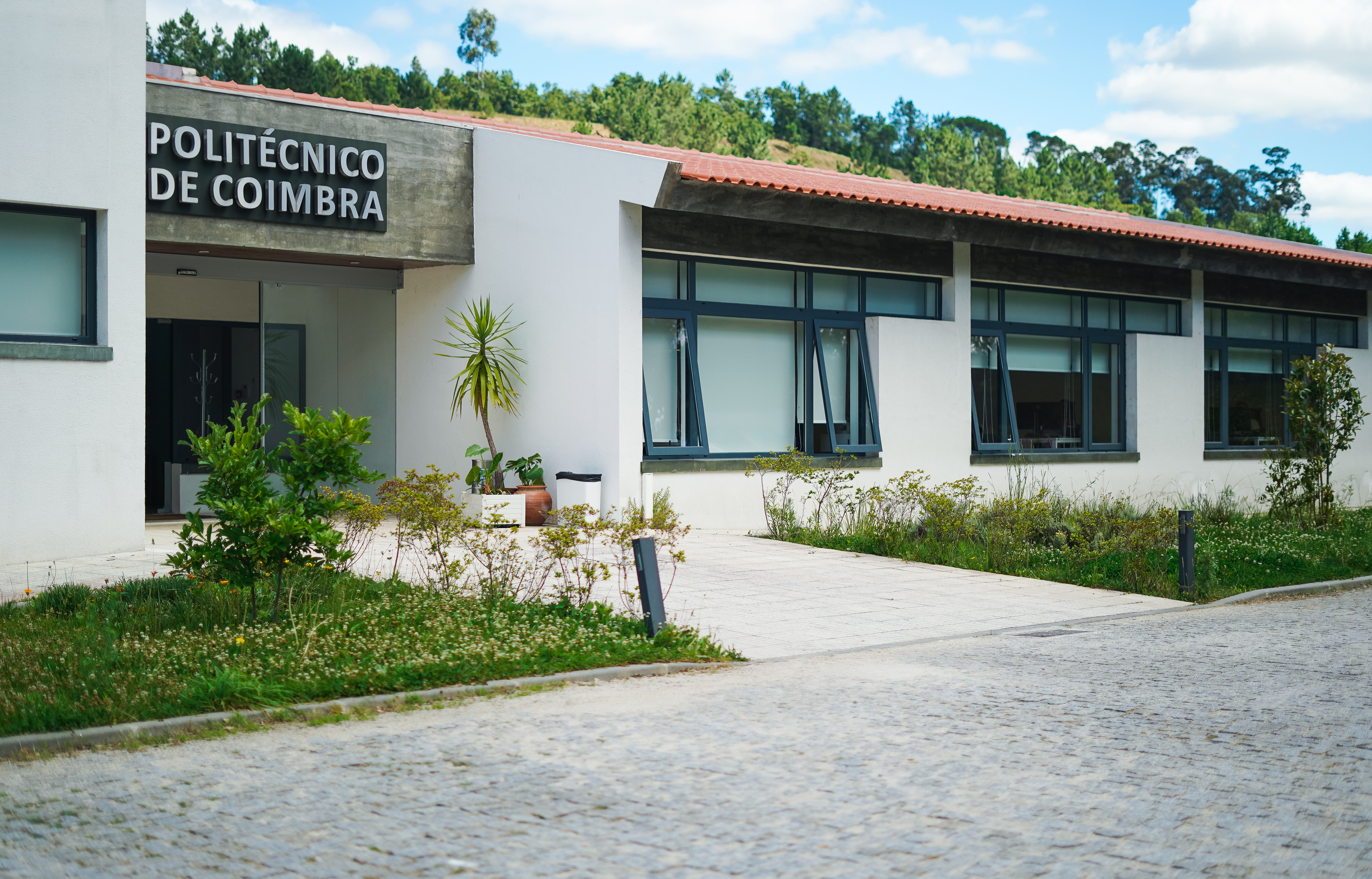 Fachada do edifício dos Serviços Centrais do Politécnico de Coimbra, localizado em Lagar dos Cortiços, S. Martinho do Bispo, Coimbra